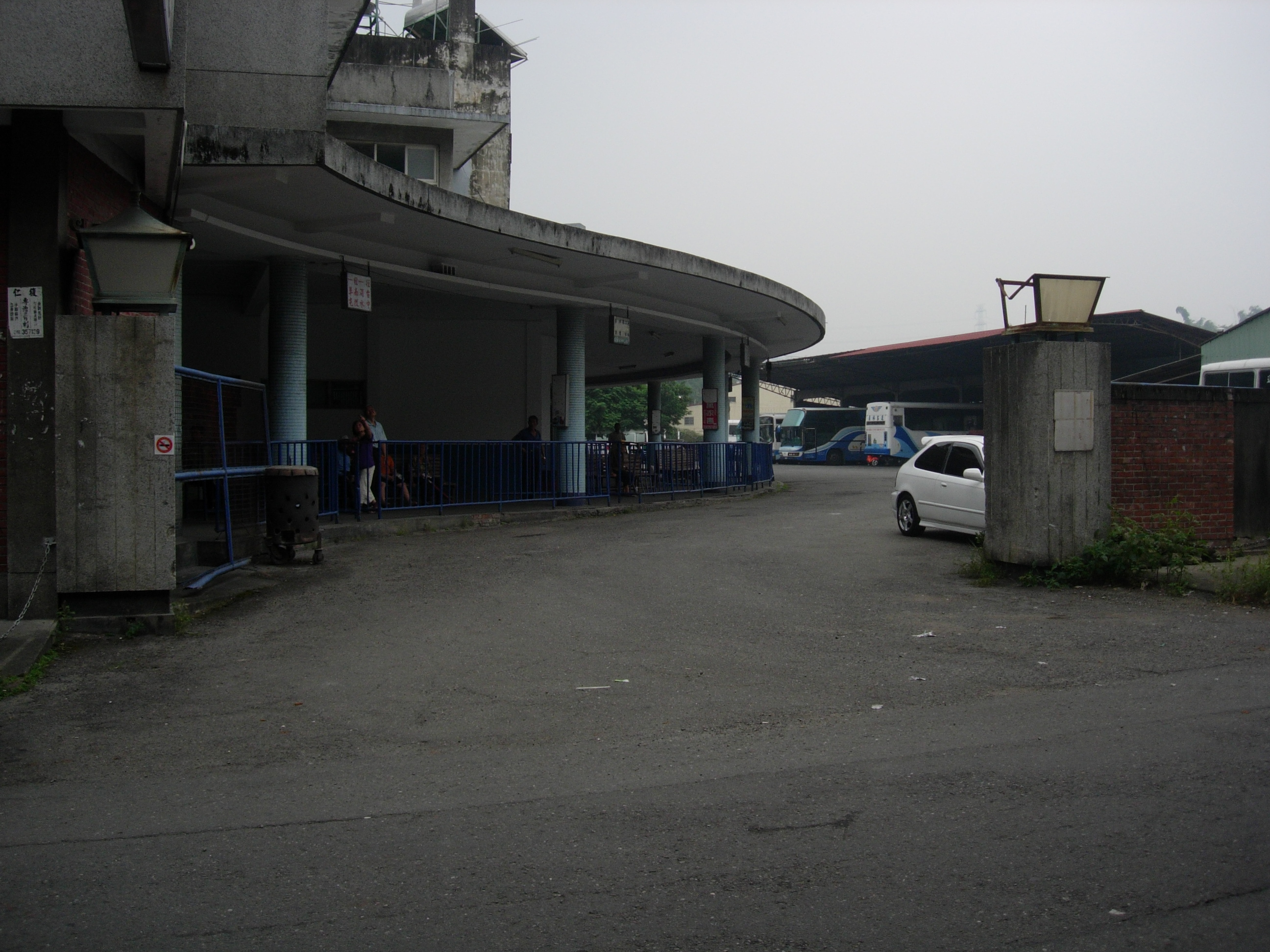 中文（台灣）: 員林客運竹山站站內